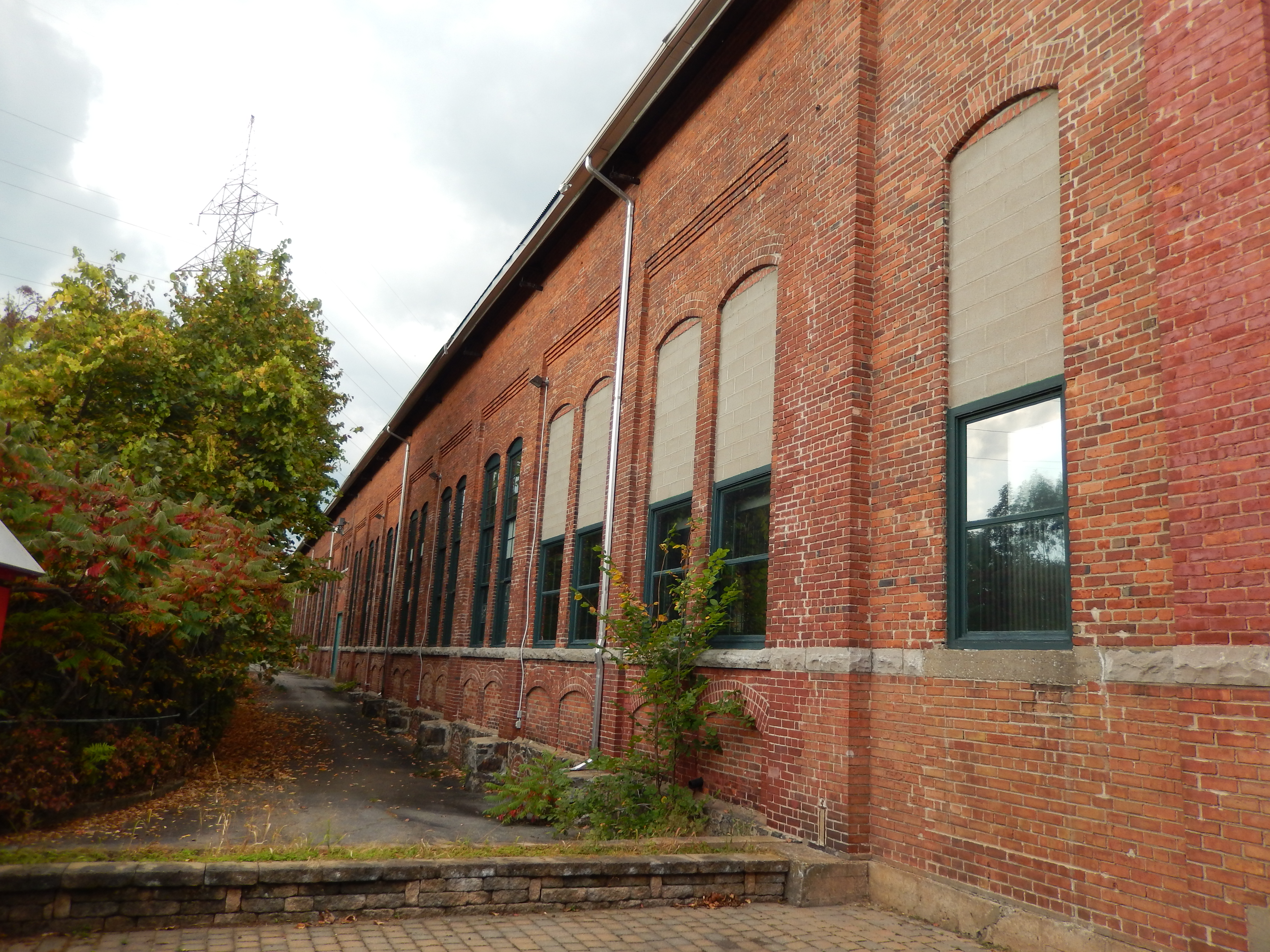 Bâtiment AL-5 de l'ancienne aluminerie de Shawinigan.